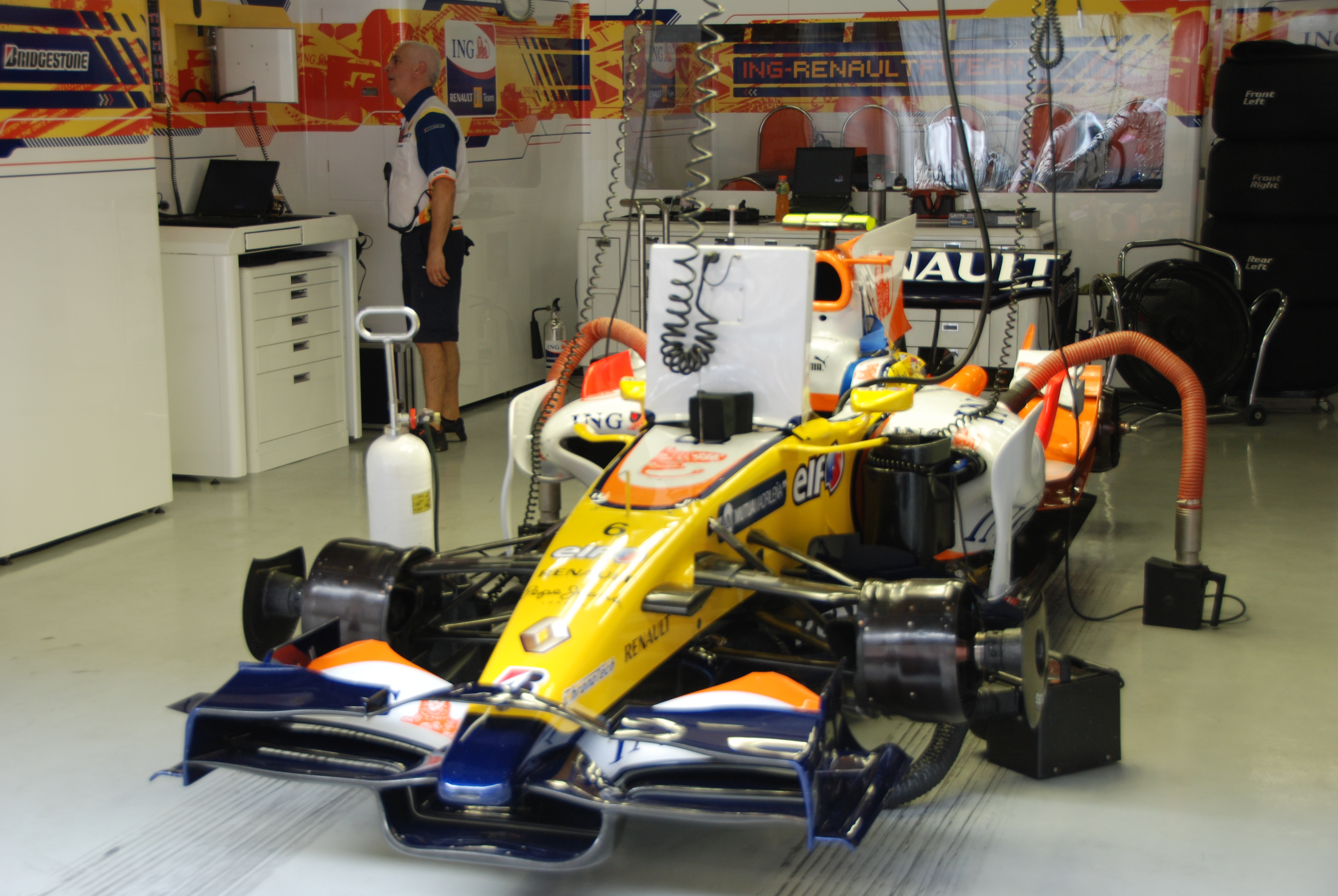 ING Renault F1 pitbox, China 2008